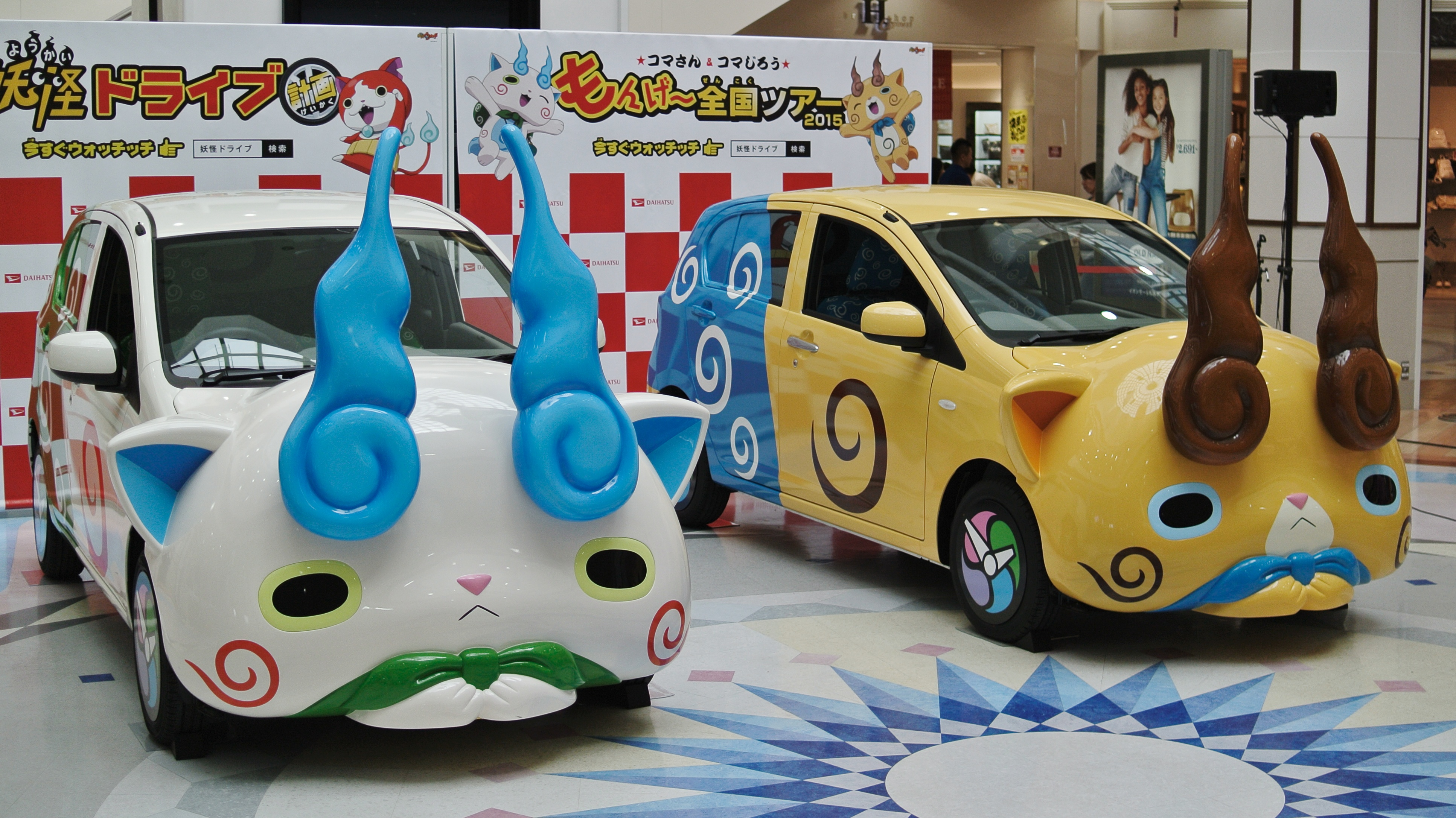 KOMA-San Car.